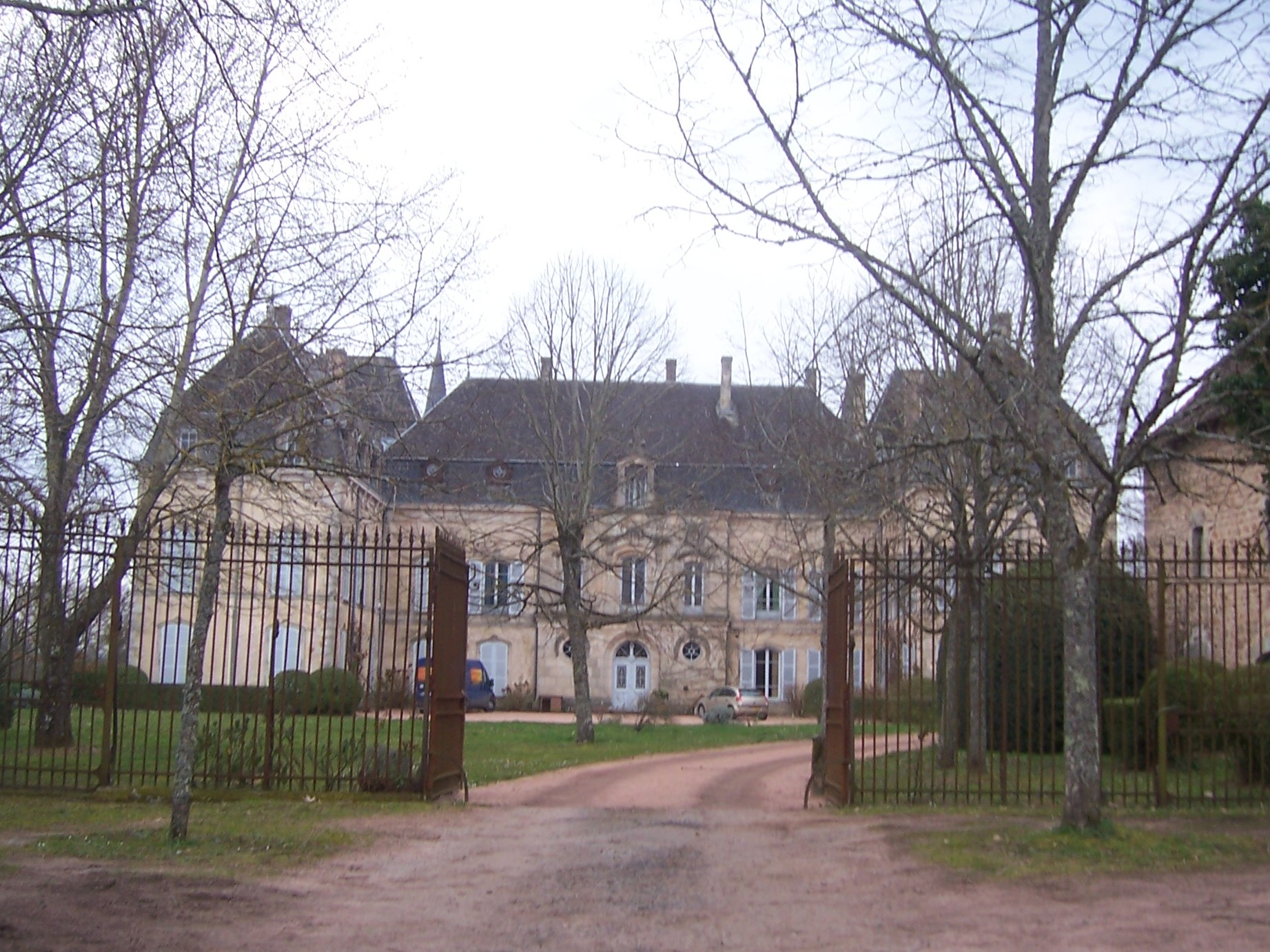 Château de Pressy-sous-Dondin